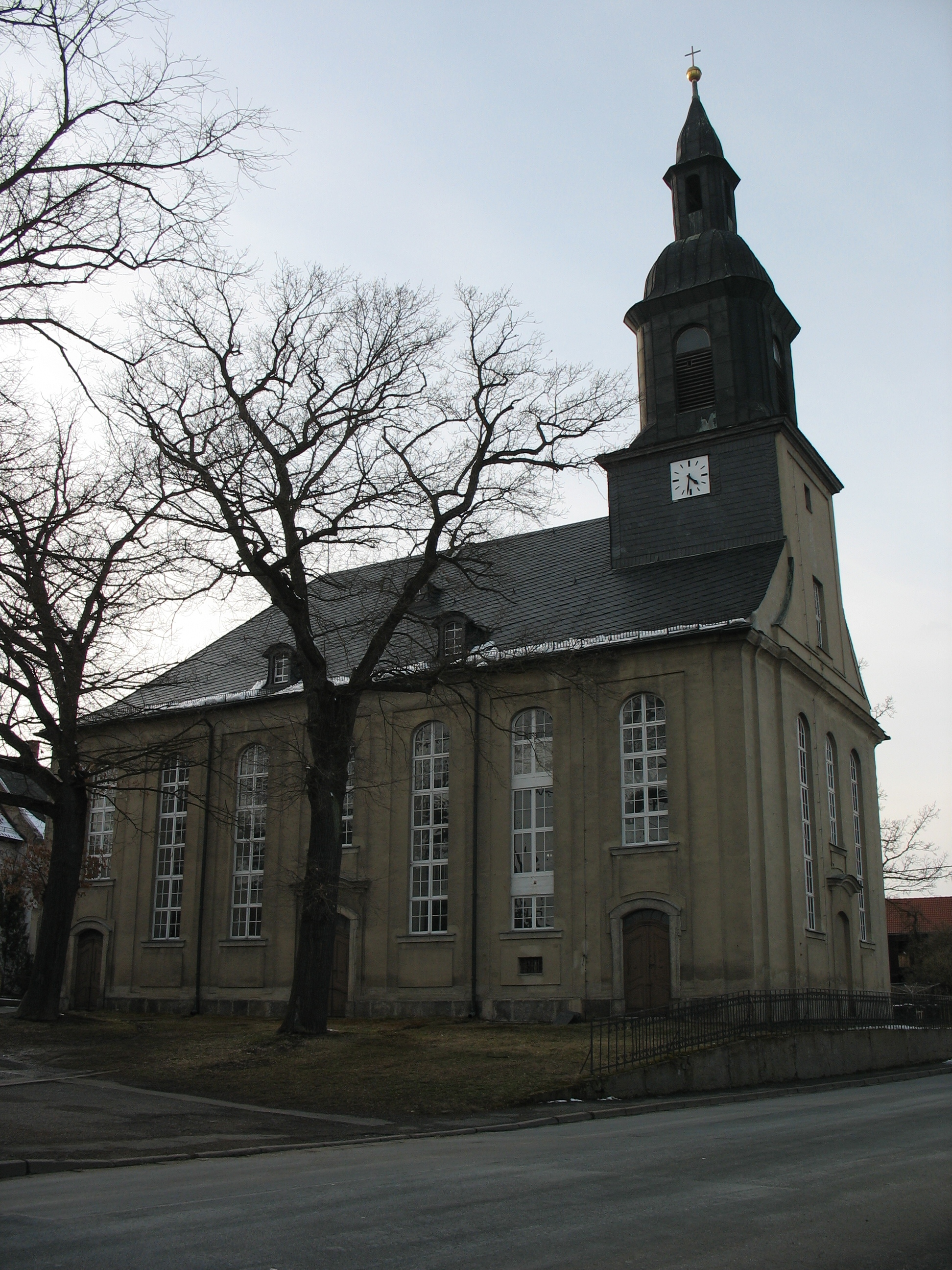 Plauen, Kirche im Stadtteil Oberlosa